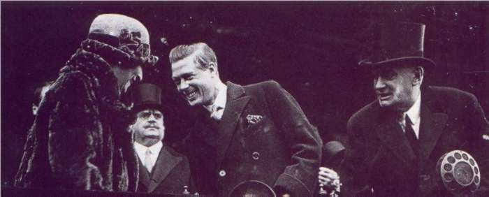 Agosto de 1925, Regina y Marcelo reciben a Eduardo de Windsor, heredero del trono de Gran Bretaña. Se durmio durante la funcion de Loreley interpretada por Beniamino Gigli y Claudia Muzio; recorrio estancias, escucho al duo Gardel-Razzano, comio asado (rociado con buen whisky), disfruto de domas y desfiles gauchos, toco el ukelele, desespero a todo el mundo cuando se escabullo durante una hora sin que nadie supiera donde estaba, visito Mar del Plata y firmo el retrato de Genaro, modesto dueño de la "trattoria" de Playa Grande entre numerosas actividades protocolares. Su visita fue muy aplaudida por su simpatia y espontaneidad, retornando años despues.